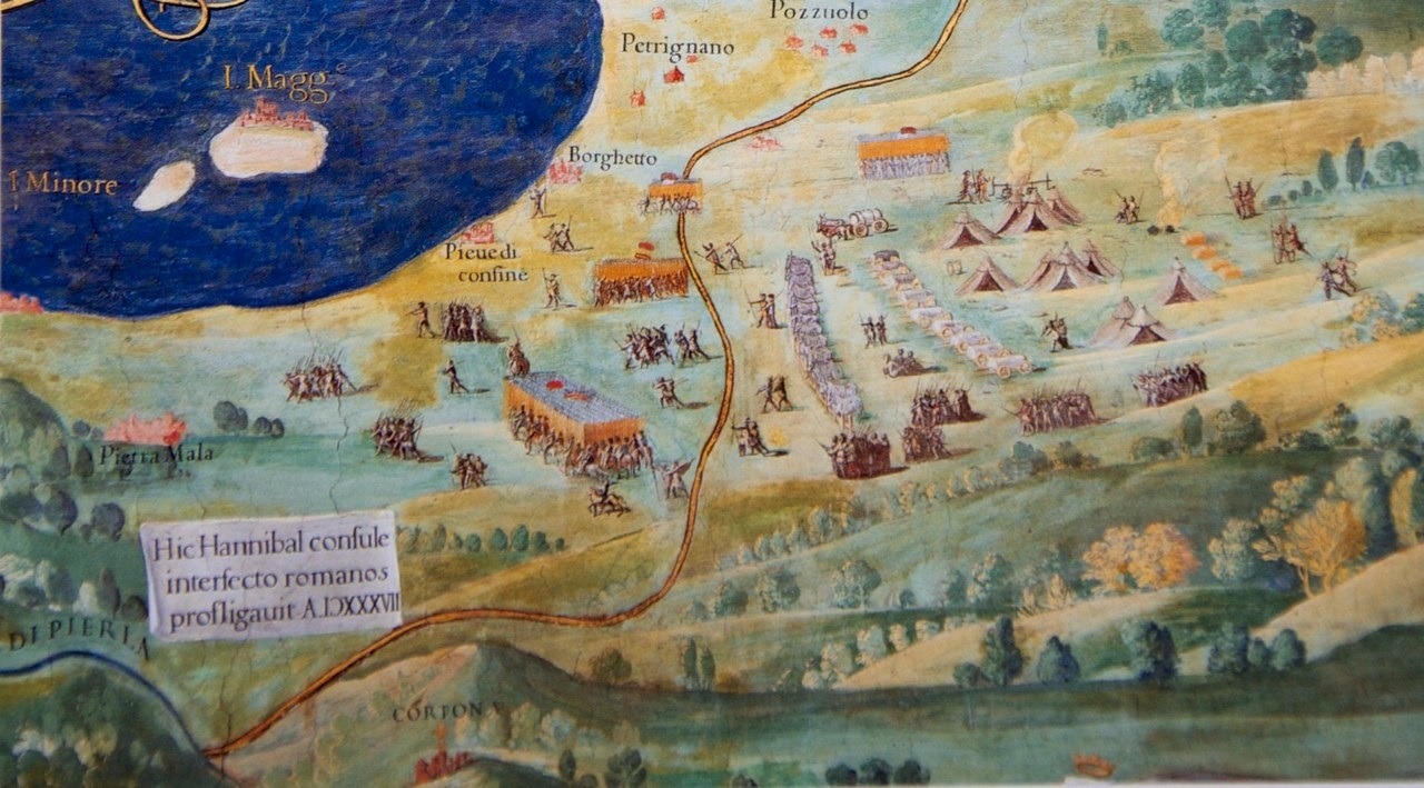 Particolare della battaglia del lago Trasimeno nell'affresco dei territori di Perugia e Città di Castello nella Galleria delle carte geografiche dei Musei vaticani a Roma. Il particolare venne aggiunto nel 1597 dal pittore Pietro Oldrado sull'affresco originale di Ignazio Danti